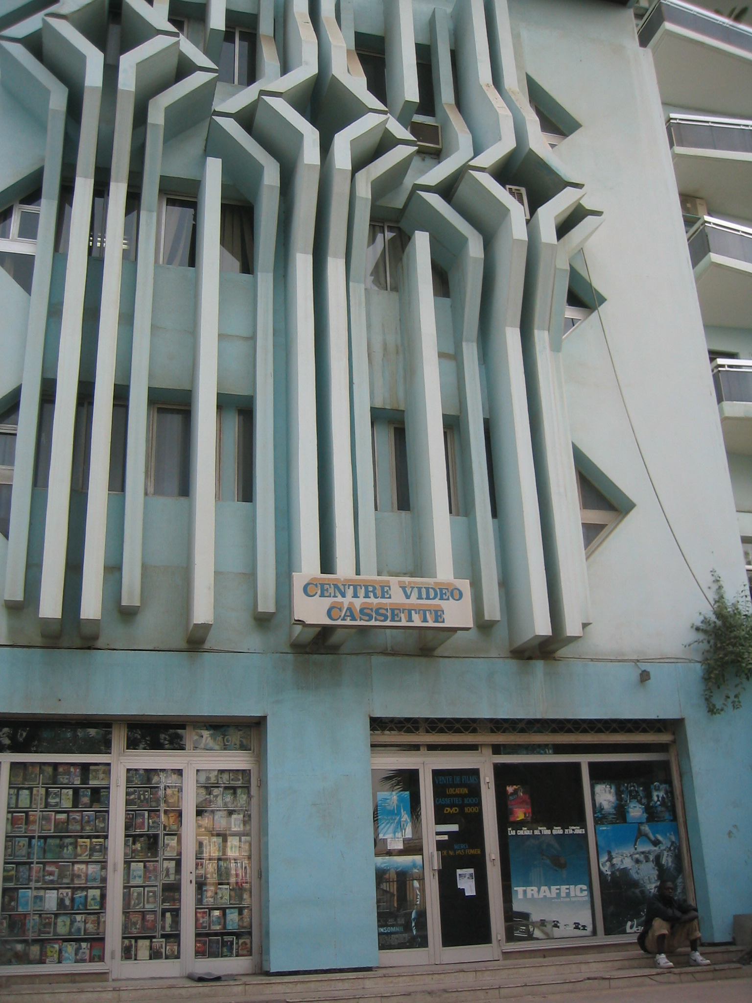 Un vidéo-club à Dakar